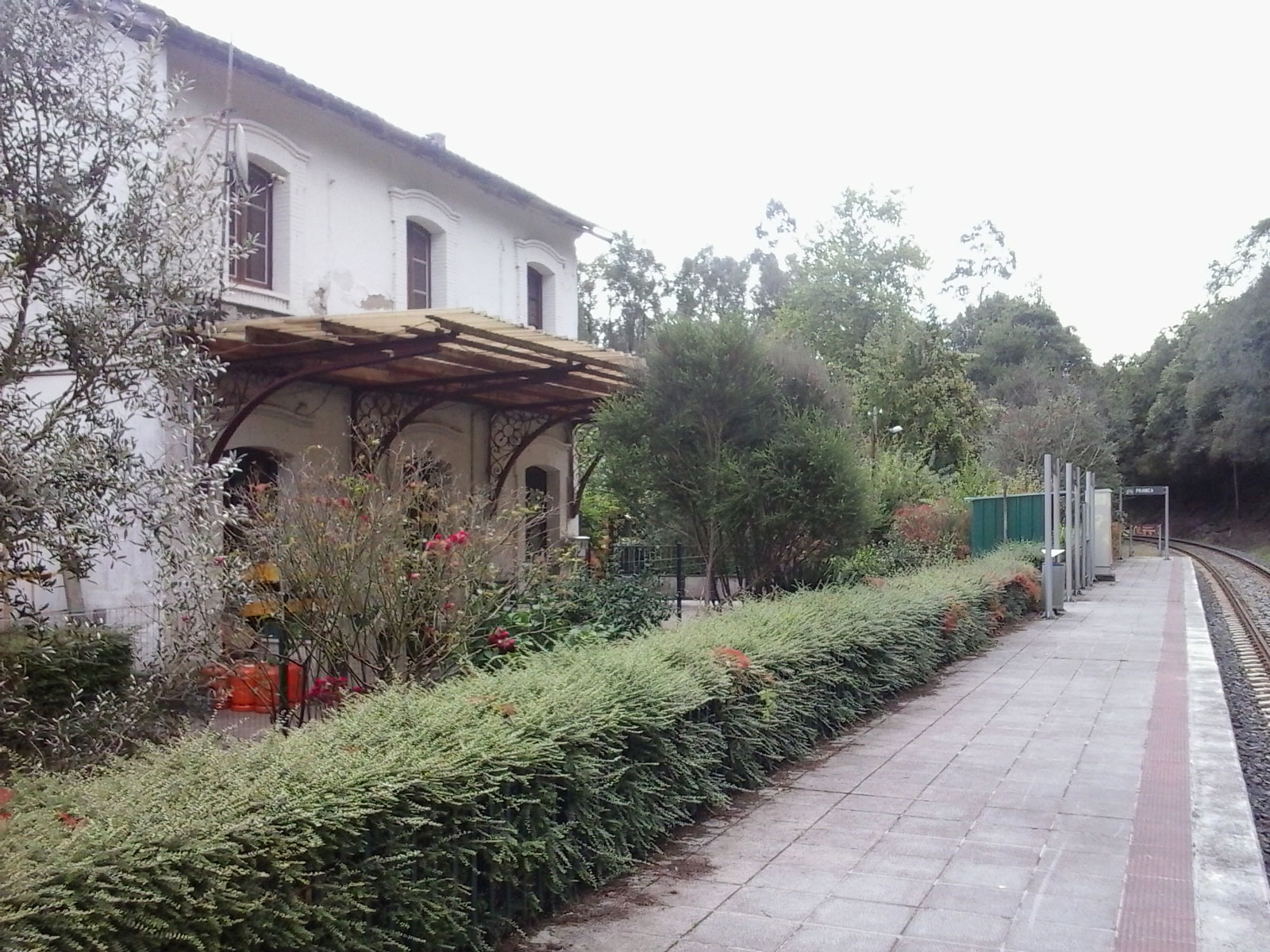 Estación Renfe de Franza, A Coruña, Galiza Spain